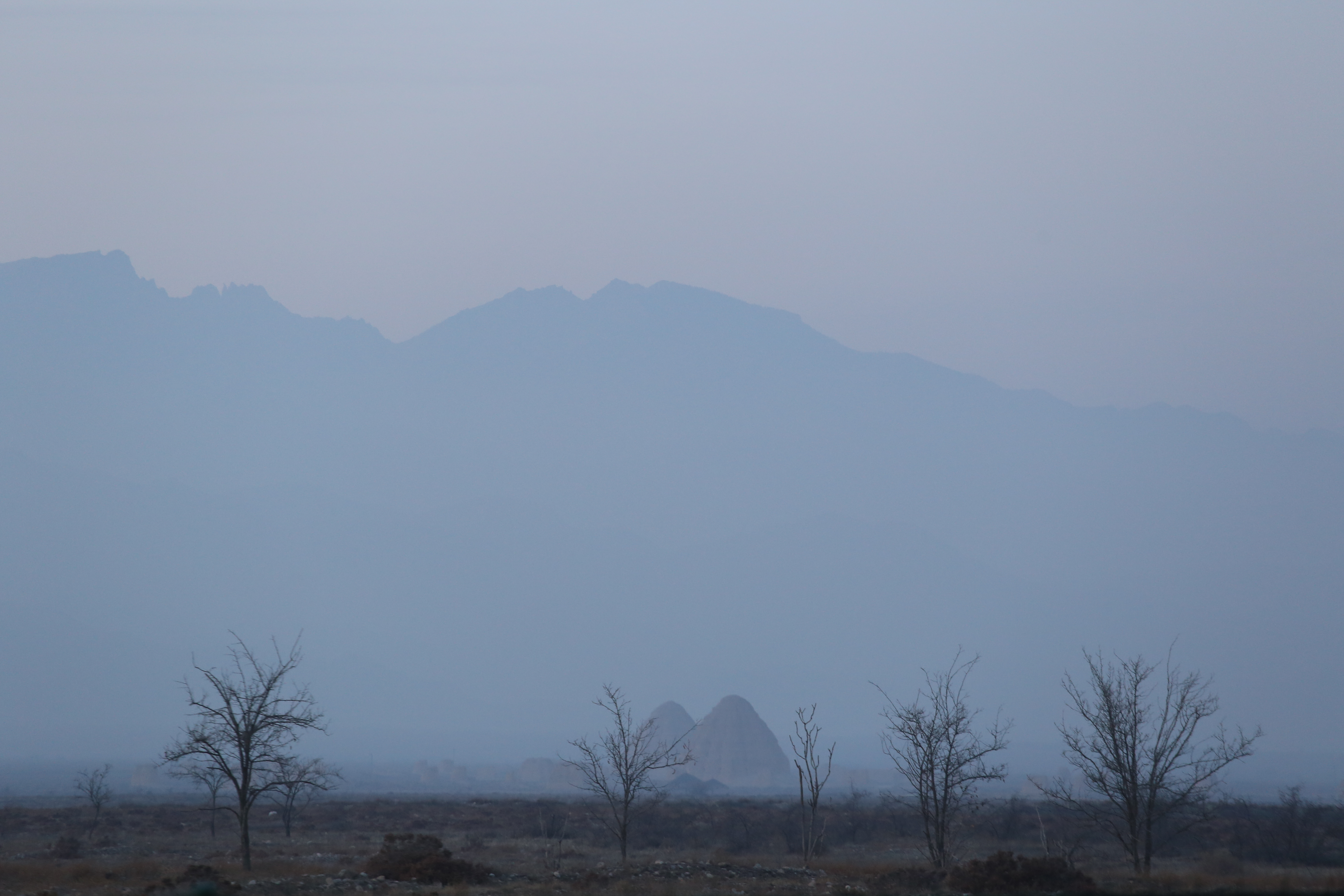 Helan Mountain and Western Xia mausoleums in the morning.Helan Mountain is the most important mountain in Ningxia.